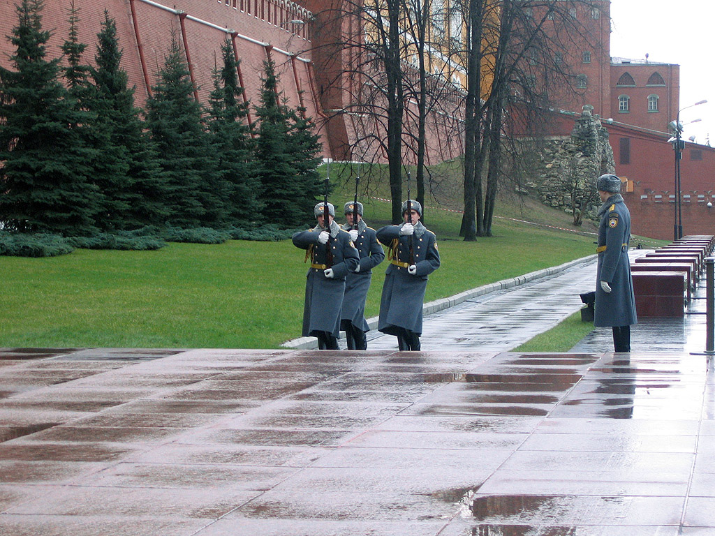 Смена почетного караула у Могилы неизвестного солдата в Москве. Январь 2007.